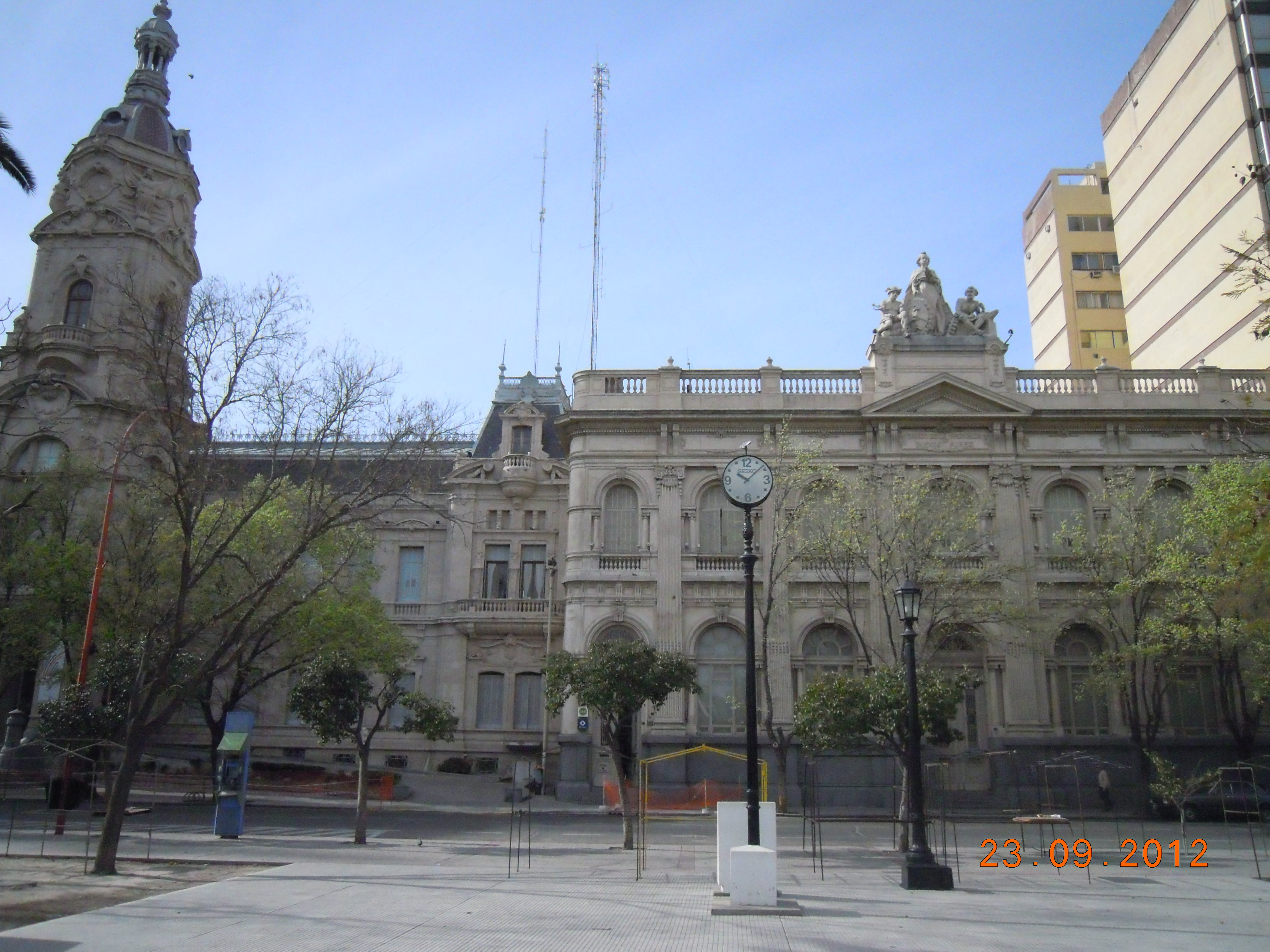 En la ciudad de Bahía Blanca-Provincia de Buenos Aires-República Argentina